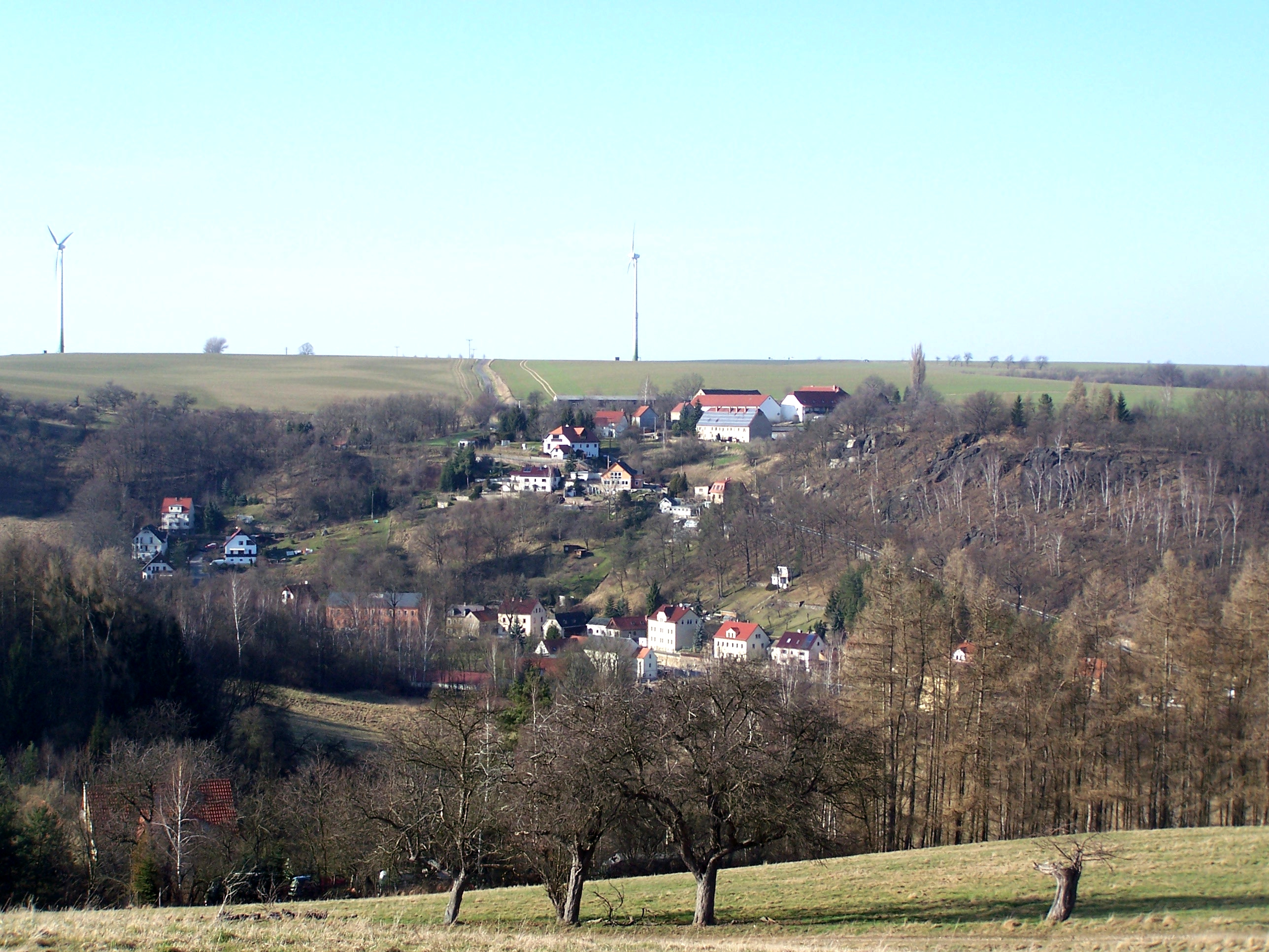 Ortsansicht Garsebach von Semmelsberg (Am Pranzer), rechts in Bildmitte die PechsteinklippenDate and/or time in the file Exif metadata are incorrect/invalid.